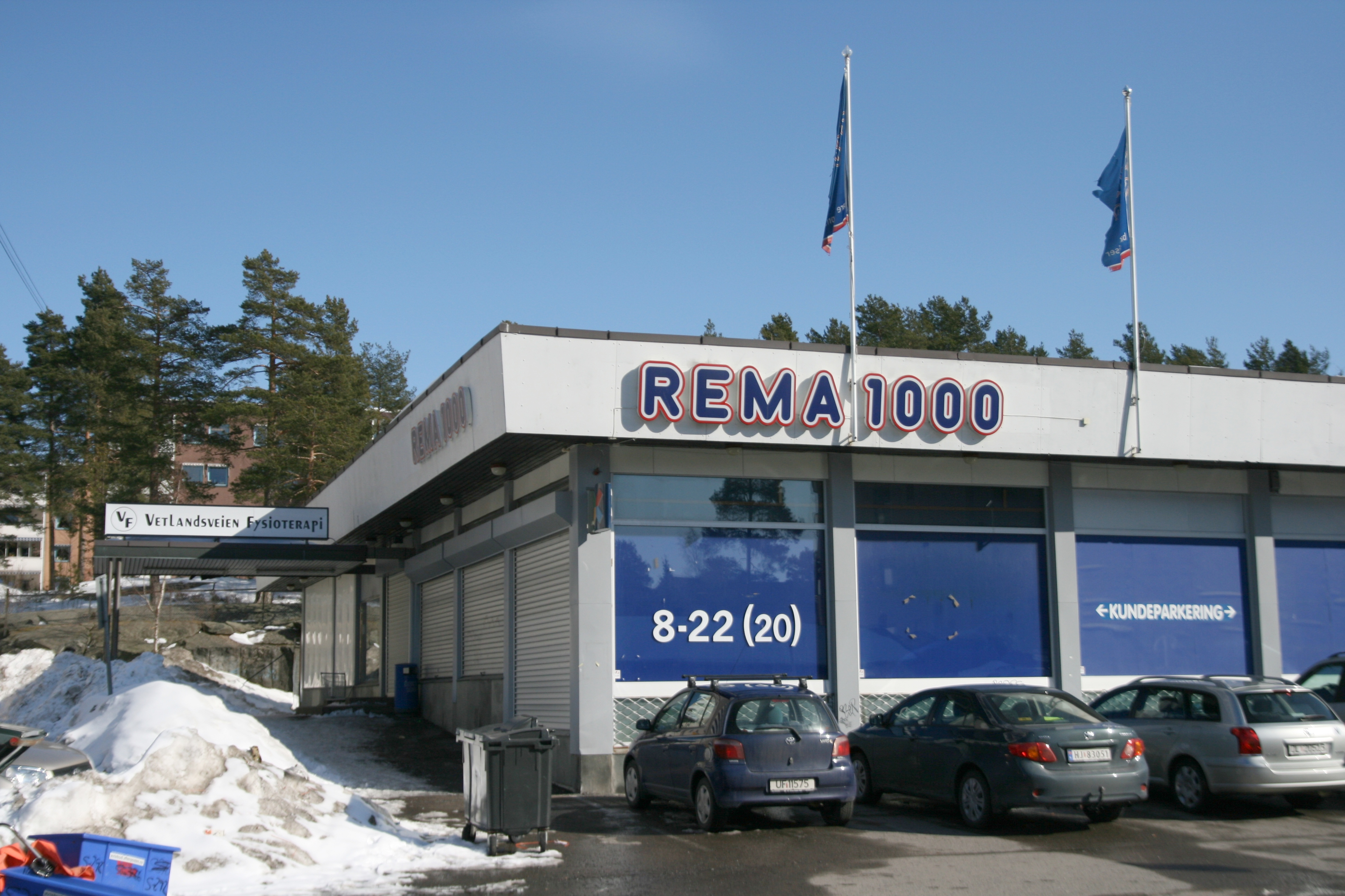 Rema 1000 i Vetlandsveien 68 på Oppsal.